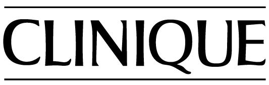 Logo "Clinique"